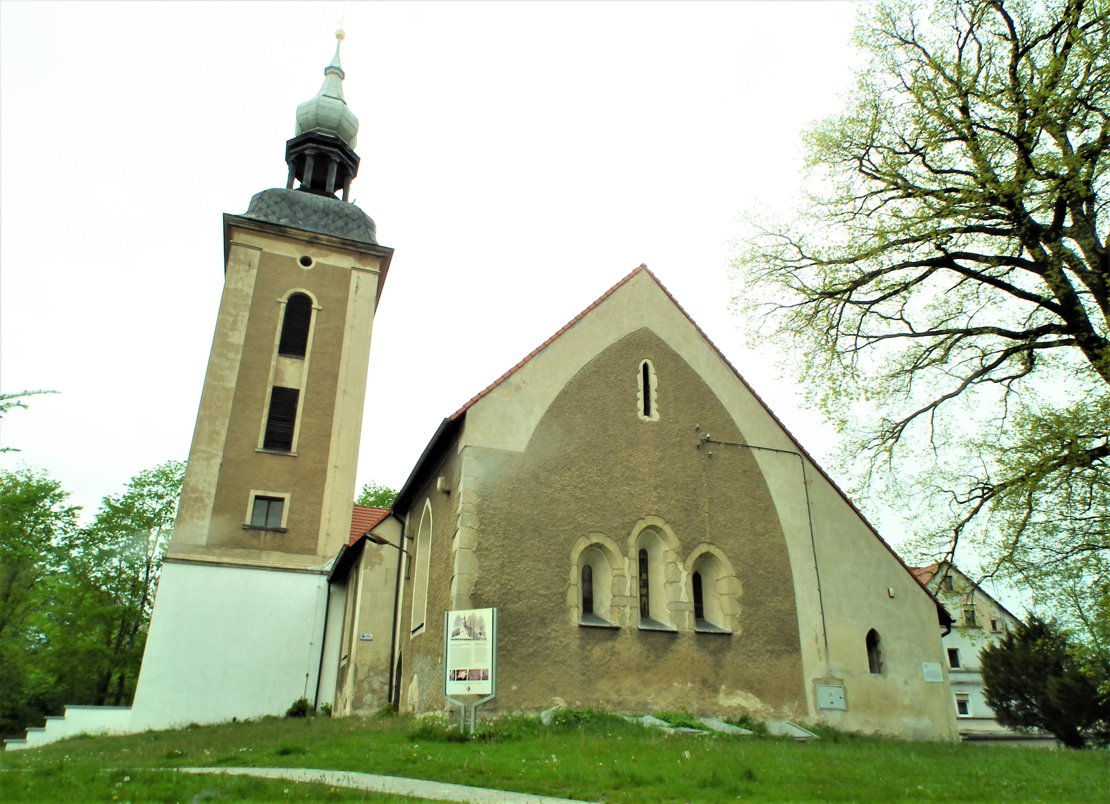 Kościół Podwyższenia Krzyża Świętego – rzymskokatolicki kościół pomocniczy należący do parafii św. Józefa Oblubieńca w Olszynie.